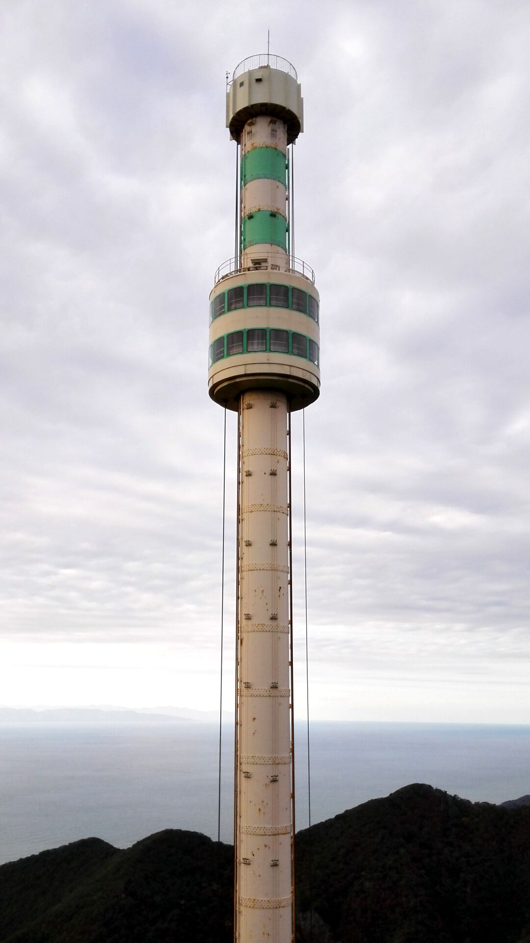 弥彦山ケーブルカー山頂駅から撮影